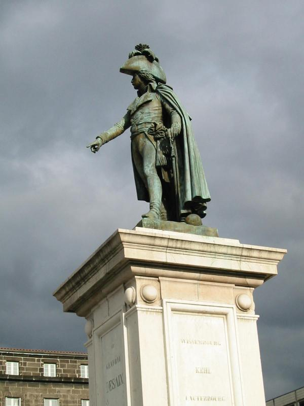 Statue du Général Desaix place de Jaude à Clermont-Ferrand.